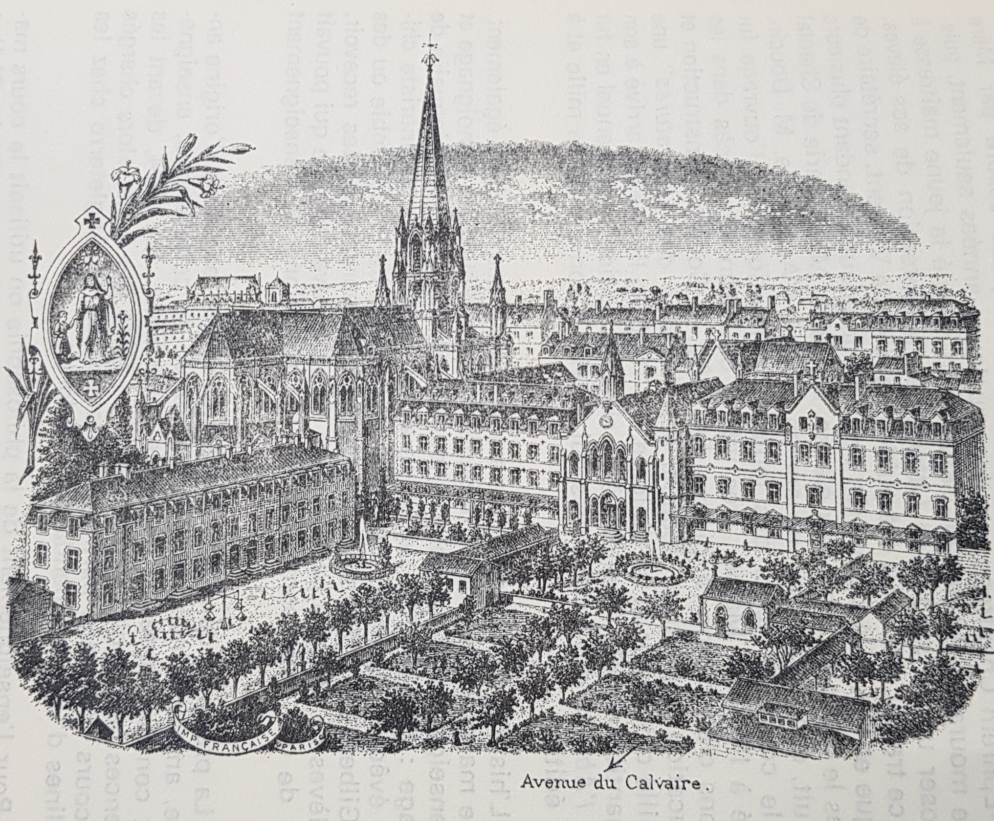 L'église saint Clément au fond à droite, et les bâtiments de l'actuelle caserne de pompiers.